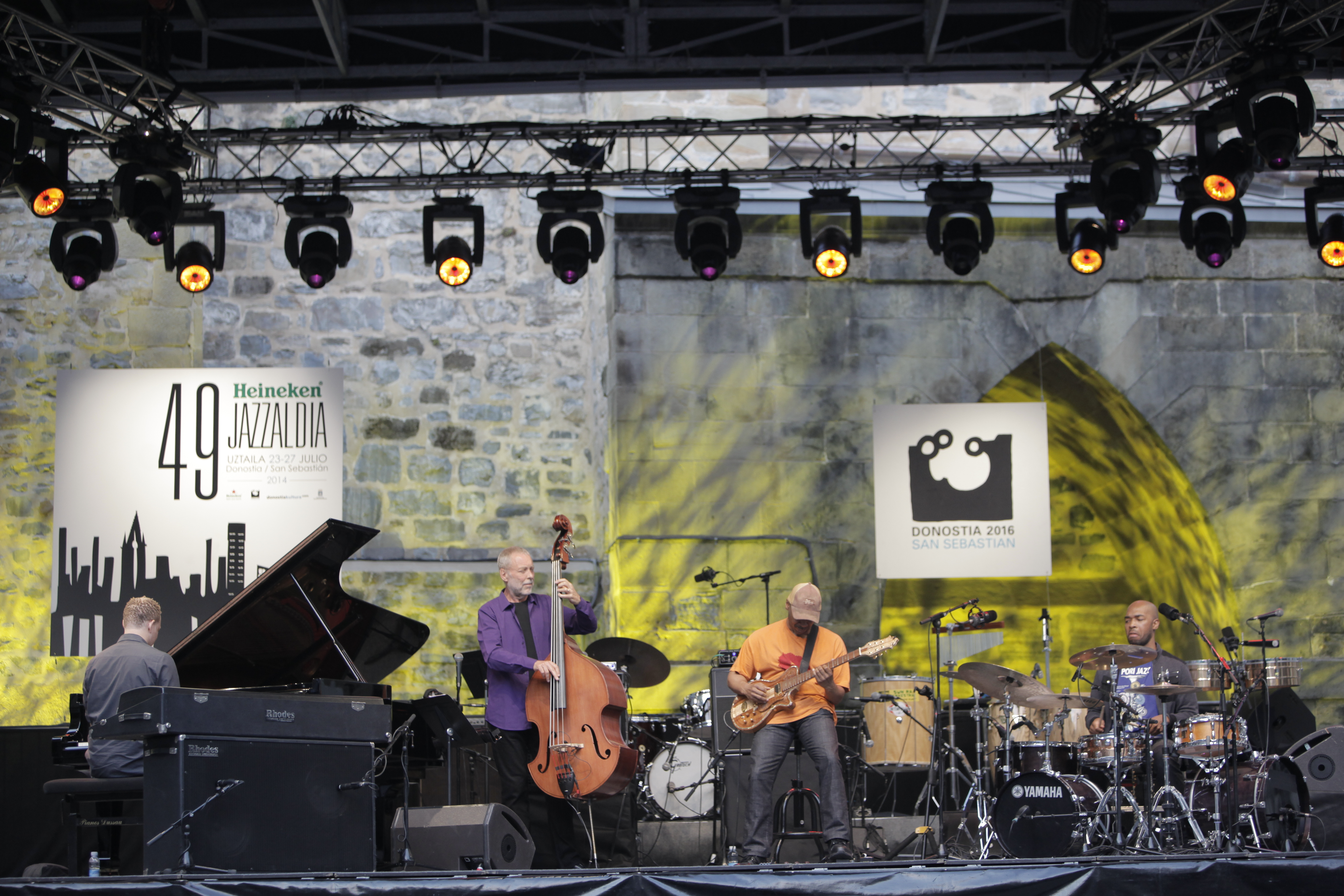 Dave Holland Trinitate Plazako agertokian (2014).